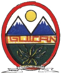 Escudo de armas del municipio de Guican